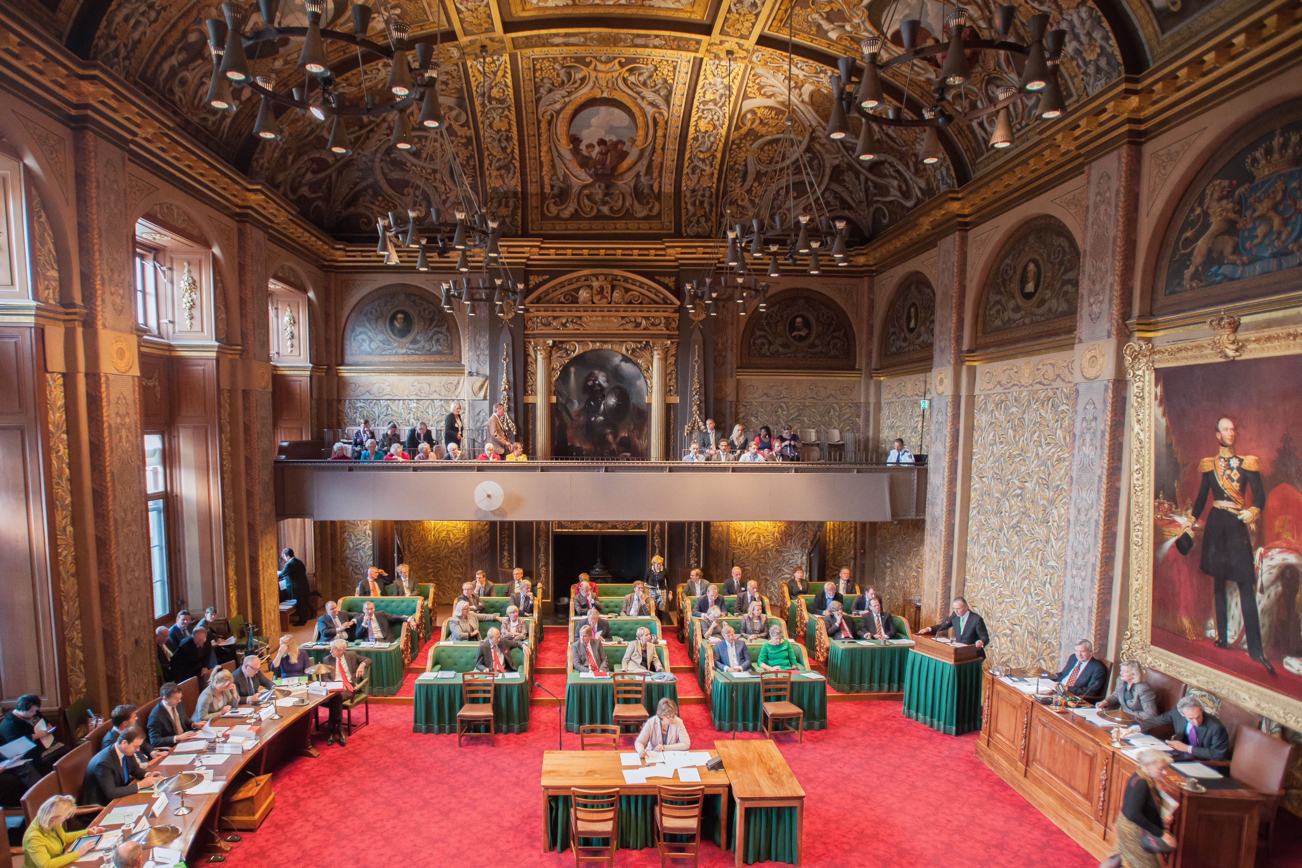 Minister-president Rutte is in de Eerste Kamer voor de Algemene Politieke Beschouwingen over de kabinetsplannen voor 2014.